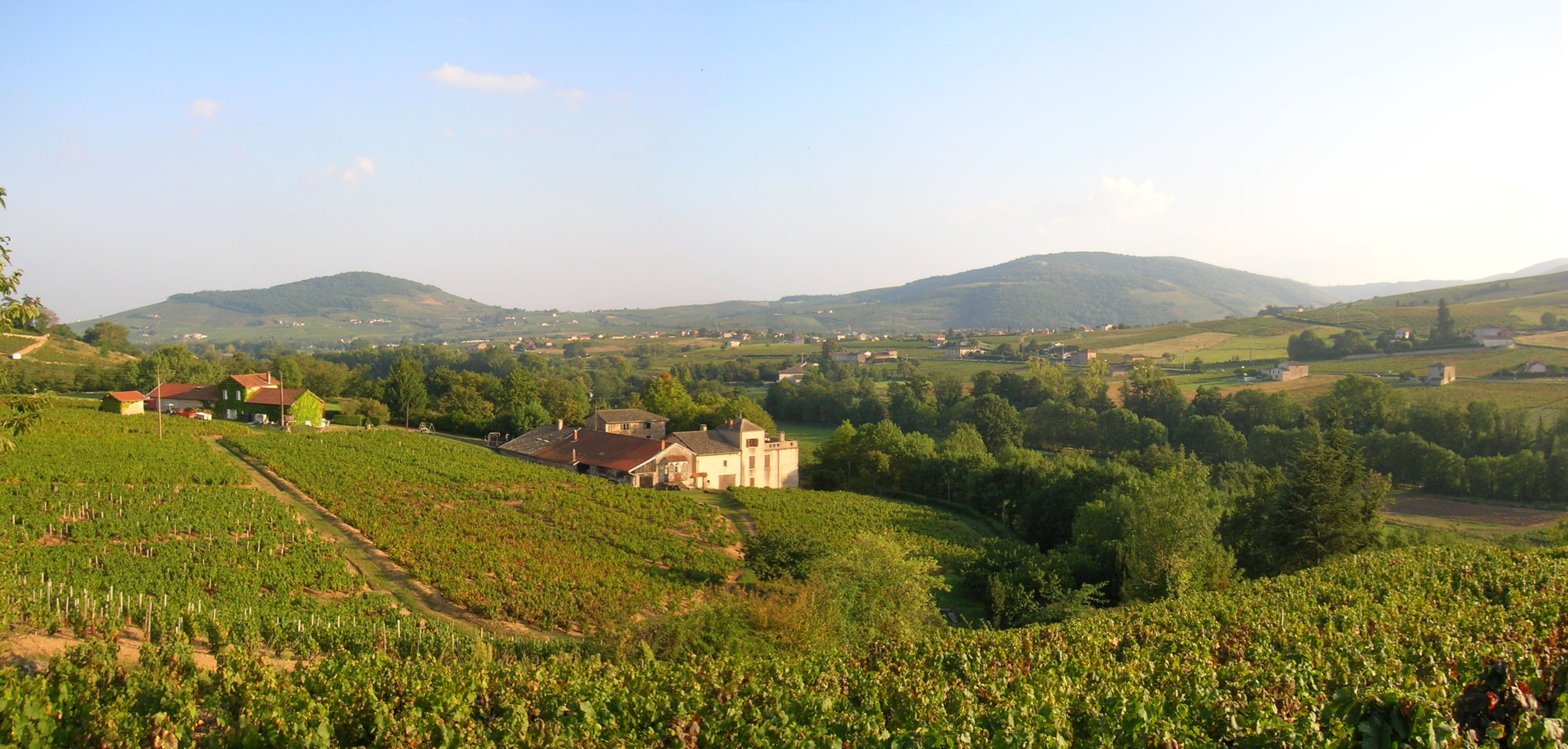 Lantignié, Rhône, FRANCE